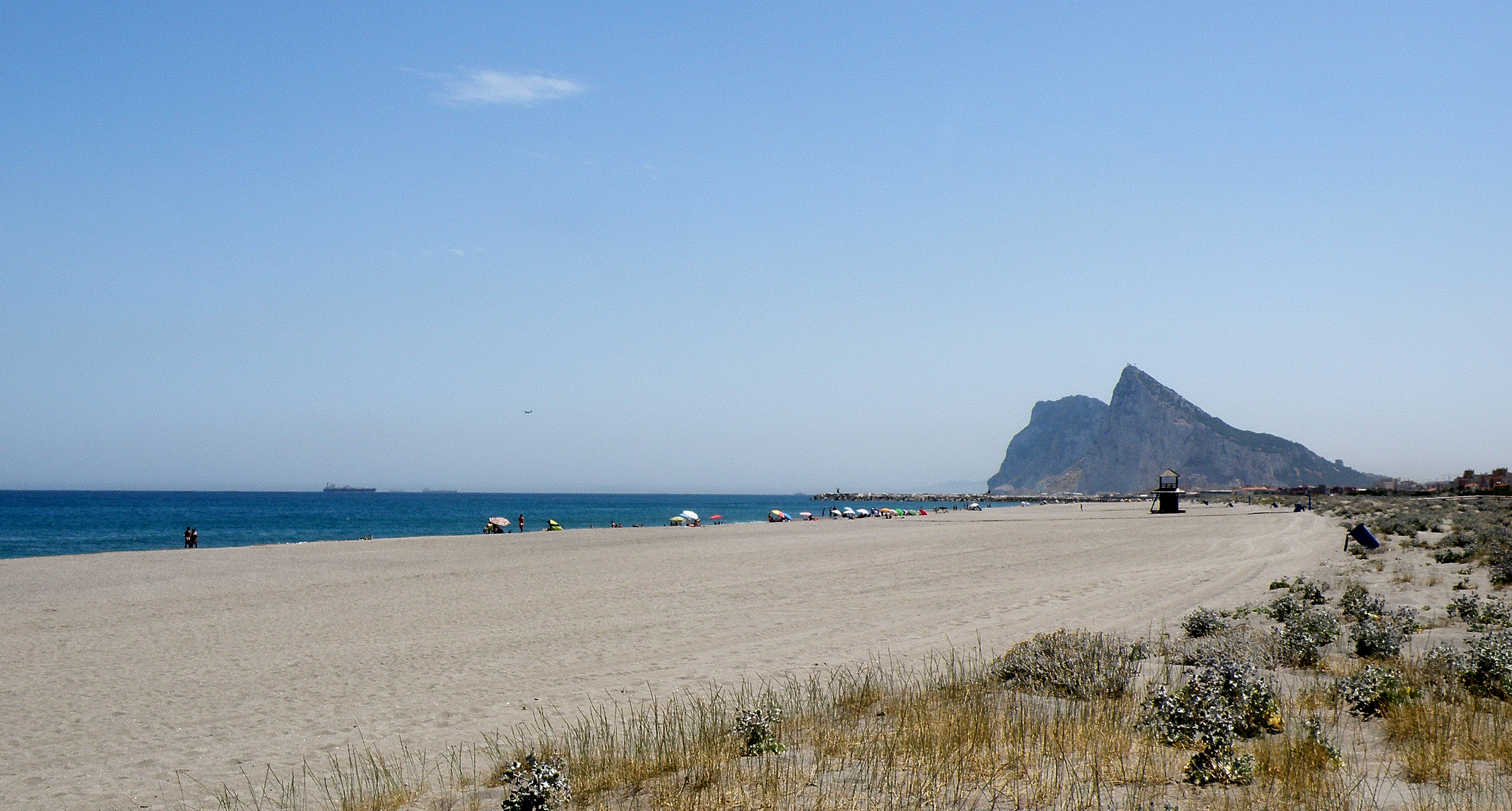 La Linea - Playa de Sobrevela